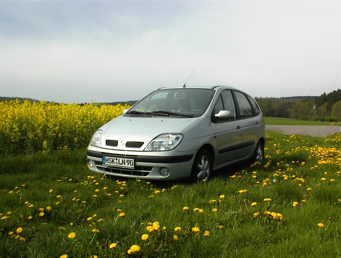 Renault Scenic 1.9dci RXE Baujahr 2001 Gekauft mit 4 km Verkauft mit 149.900km nach 6 Jahren